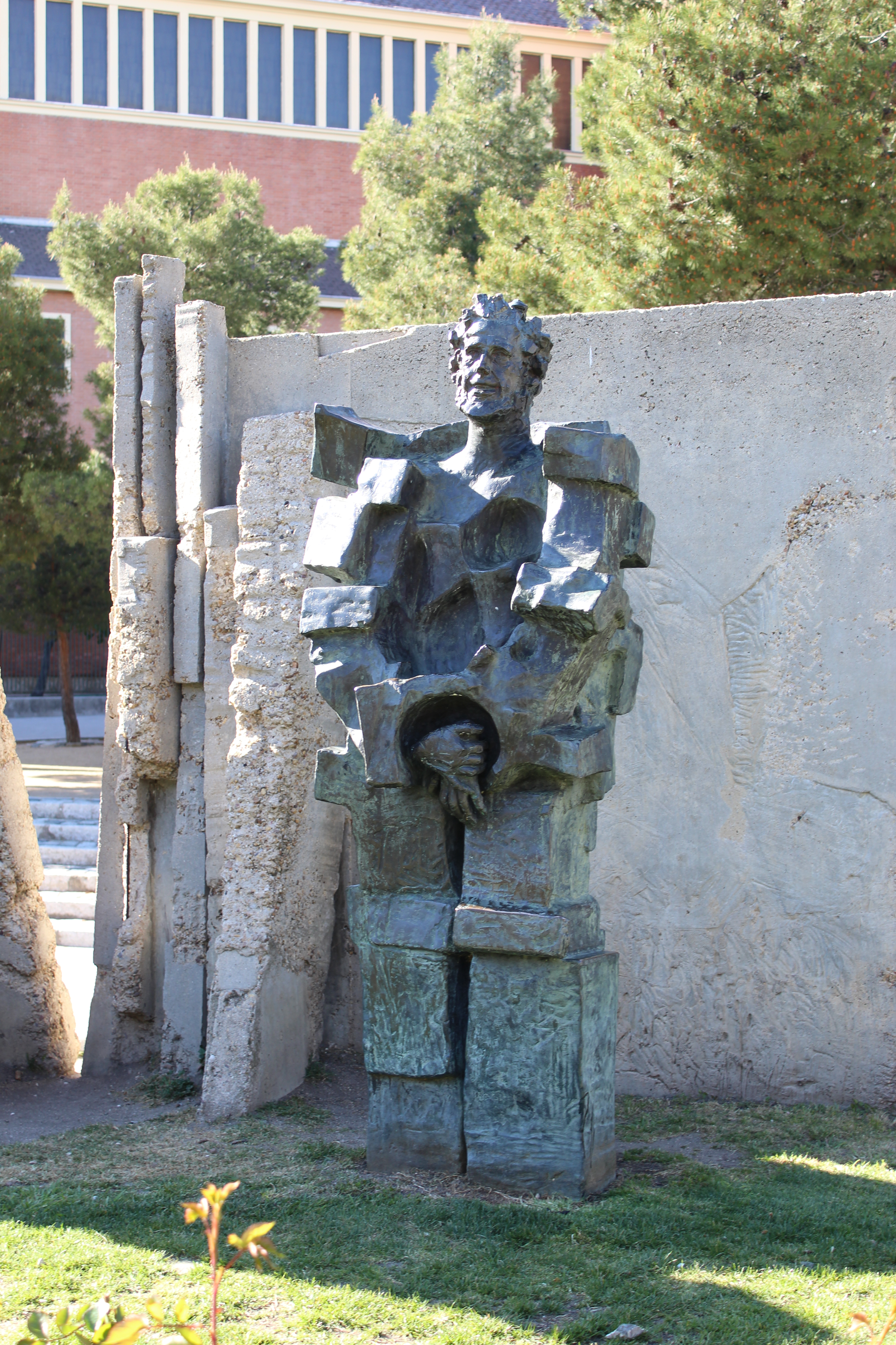 Monumento a Julián Besteiro, de José Noja.